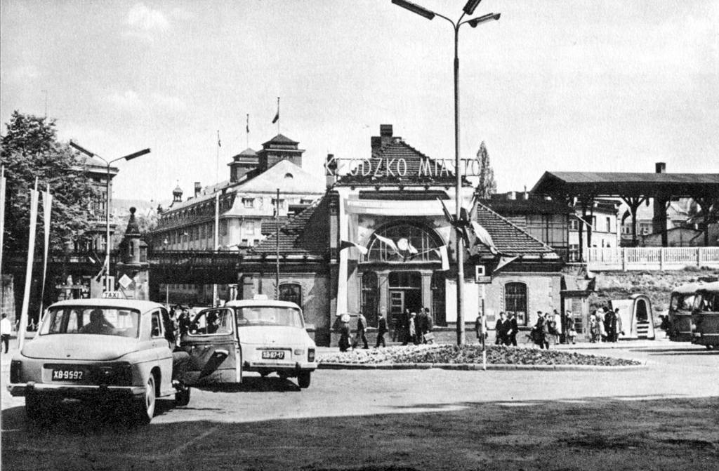 This photograph is in the public domain because according to the Art. 3 of copyright law of March 29, 1926 of the Republic of Poland and Art. 2 of copyright law of July 10, 1952 of the People's Republic of Poland, all photographs by Polish photographers (or published for the first time in Poland or simultaneously in Poland and abroad) published without a clear copyright notice before the law was changed on May 23, 1994 are assumed public domain in Poland. This work is in the public domain in the United States because it meets three requirements: it was first published outside the United States (and not published in the U.S. within 30 days), it was first published before 1 March 1989 without copyright notice or before 1964 without copyright renewal or before the source country established copyright relations with the United States, it was in the public domain in its home country (Poland) on the URAA date (1 January 1996). To uploader: Please provide where and when the image was first published. Dworzec Kłodzko Miasto na starej karcie pocztowej